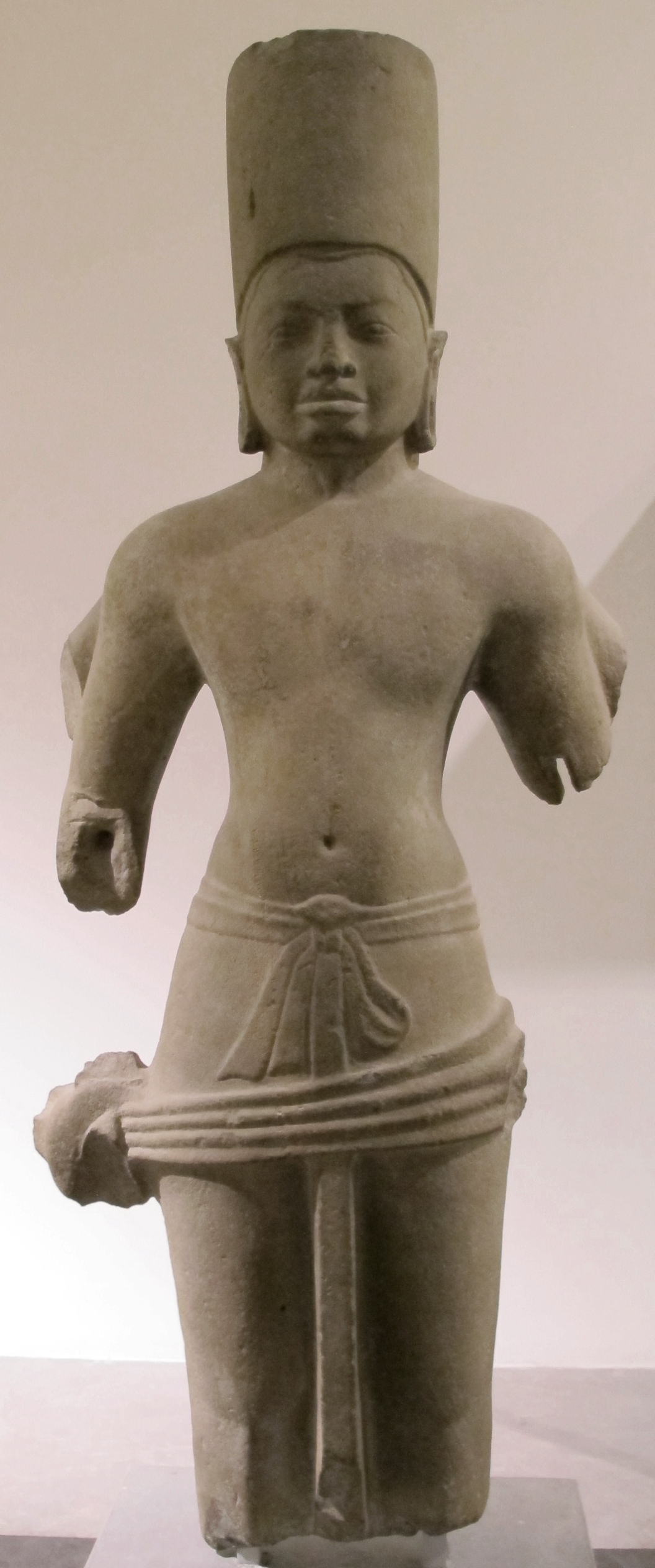 Thailandia, visnu da provincia di prachinburi, vii-viii sec